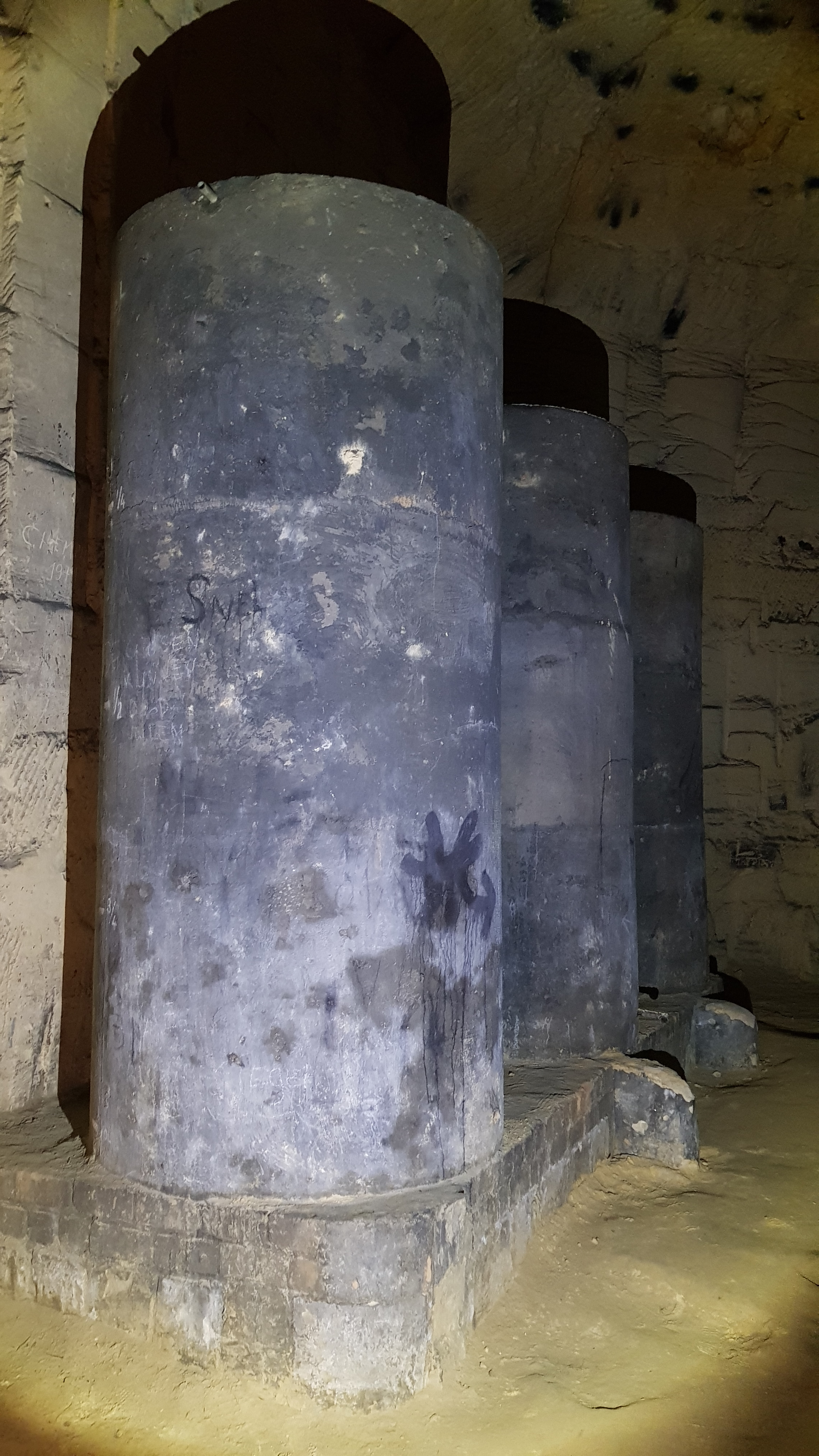 Gangenstelsel Zonneberg in de Sint-Pietersberg, Maastricht, Nederland